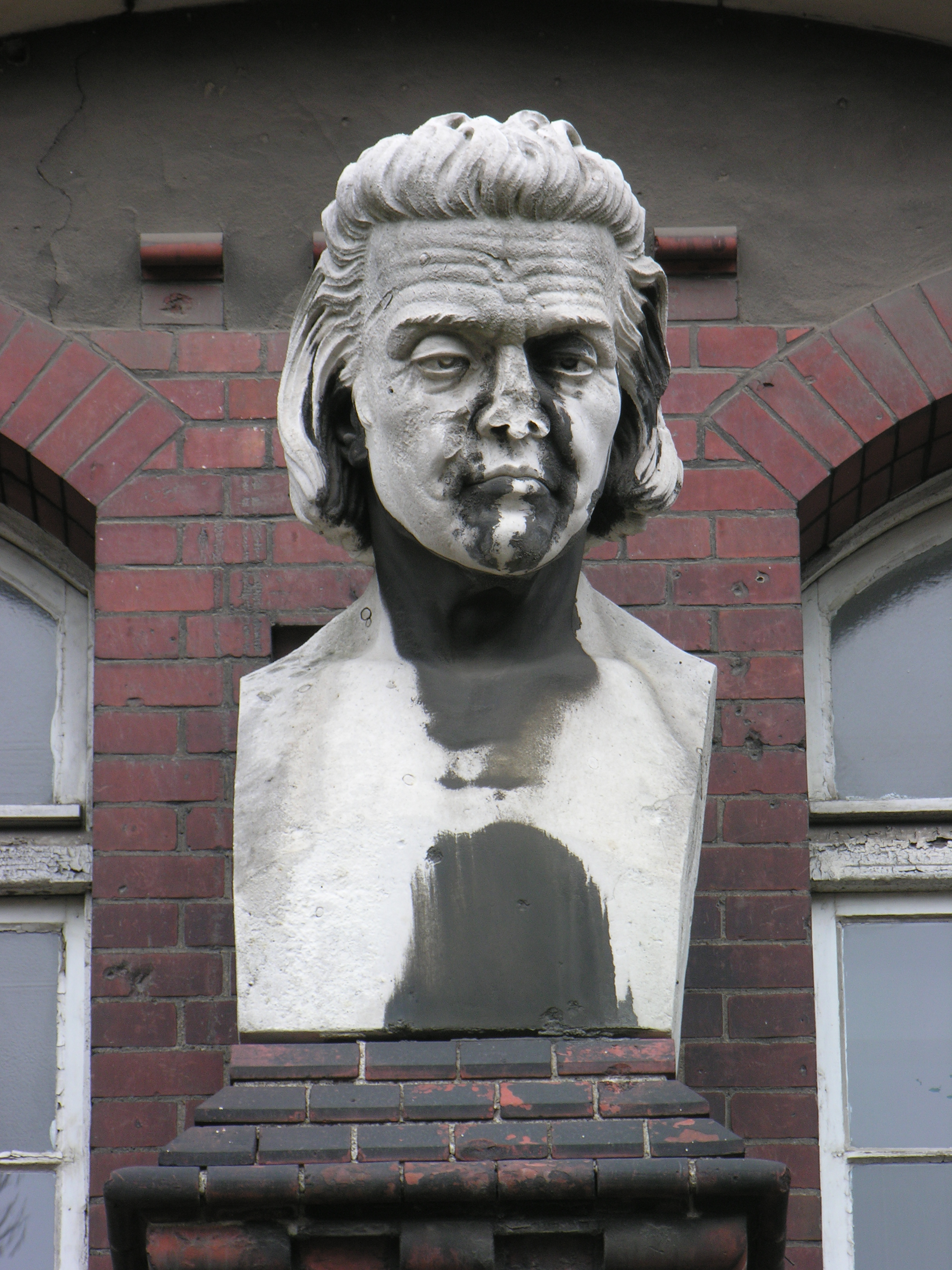 Popiersie Pestalozziego na budynku Szkoły Podstawowej nr 1 we Wrocławiu, ul. Nowowiejska 78